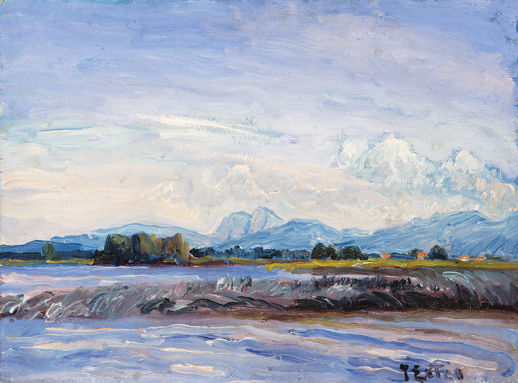 Seelandschaft